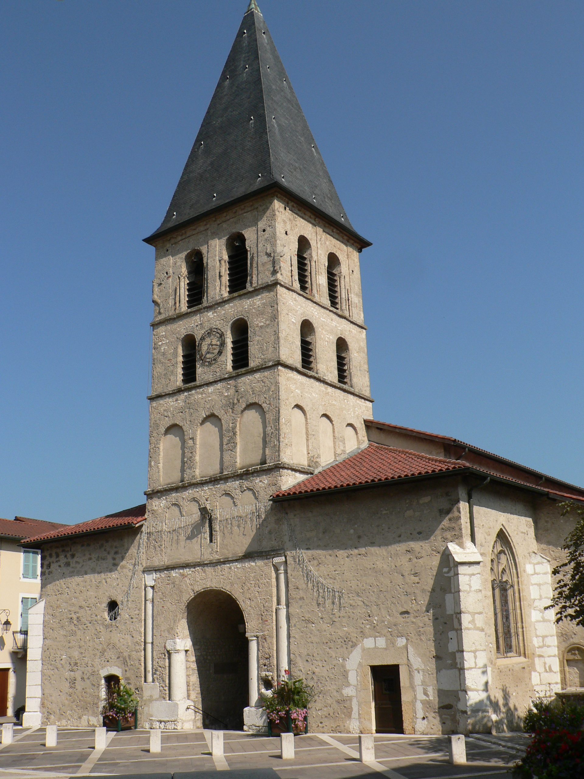 Tullins (Isère, France), église St Laurent-des-Prés. Clocher classé M.H., reste de l'église inscrit.